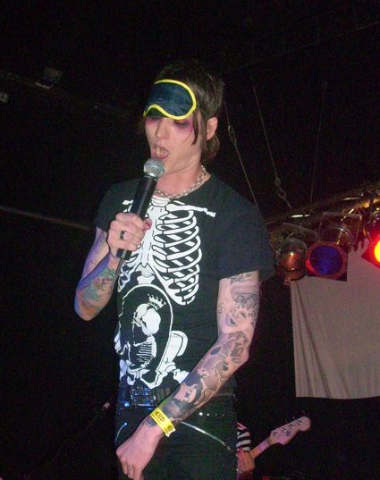 Live-Foto der Band Big Boy